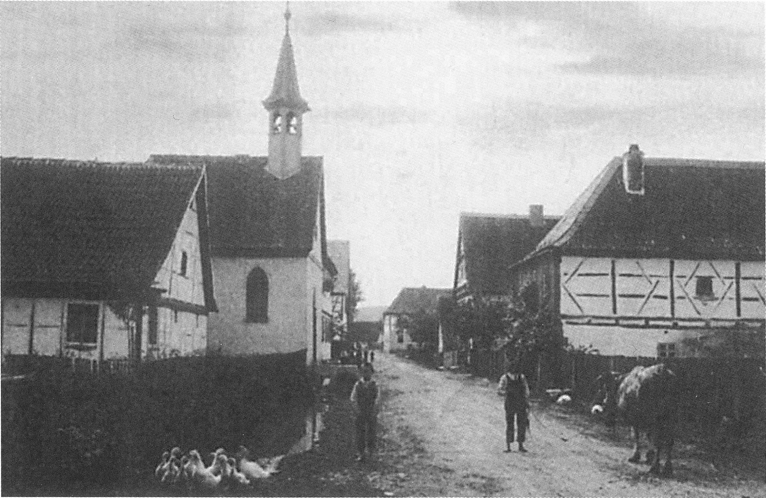 Die Dorfstraße durch Burkheim im Jahr 1910.